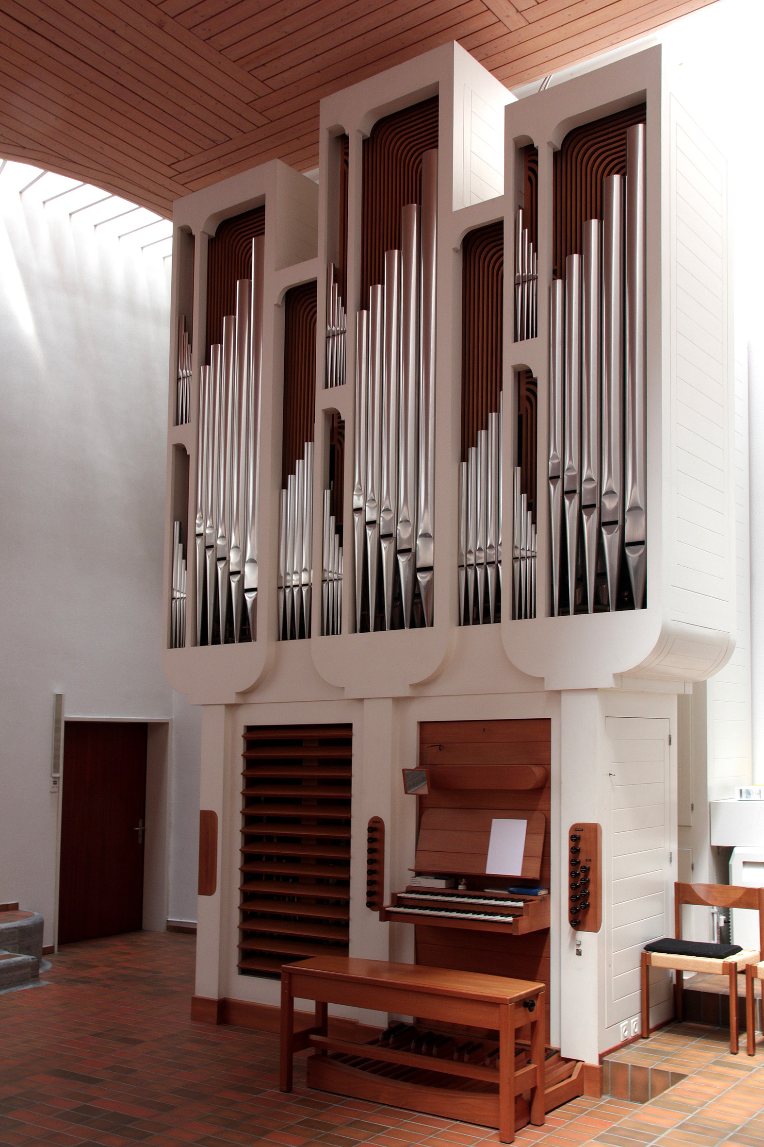 Römisch-katholische Kirche Maria Hilf, Zürich-Leimbach